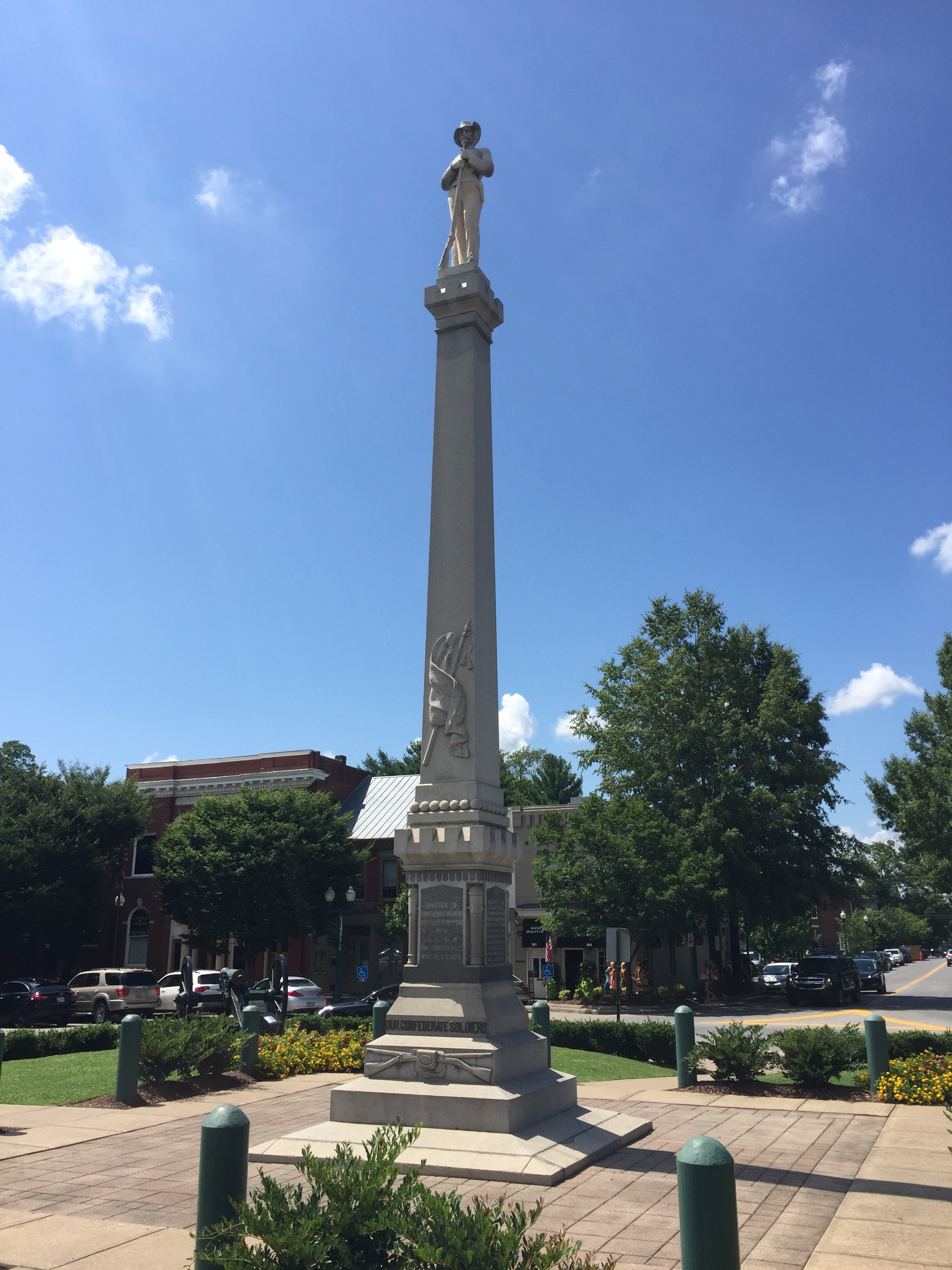 1899 Confederate Monument